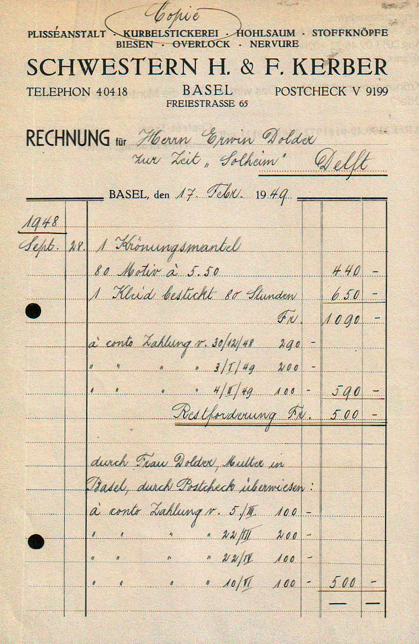 Rechnung Schwestern H. & F. Kerber, Freiestraße 65, Basel für Erwin Dolder, z. Z. „Solheim“, Delft vom 17. Februar 1949 über 1 Krönungsmantel, 80 Motiv, 1 Kleid bestickt. Bezahlt durch die Mutter von Erwin Dolder.